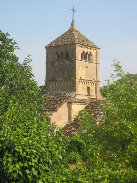 Ameugny, Saône-et-Loire, Bourgogne, France. L'église du village.